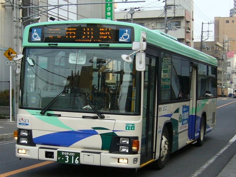 登録番号 習志野200か・316 市川交通自動車所属 2006年2月3日 市川交通車庫付近にて撮影